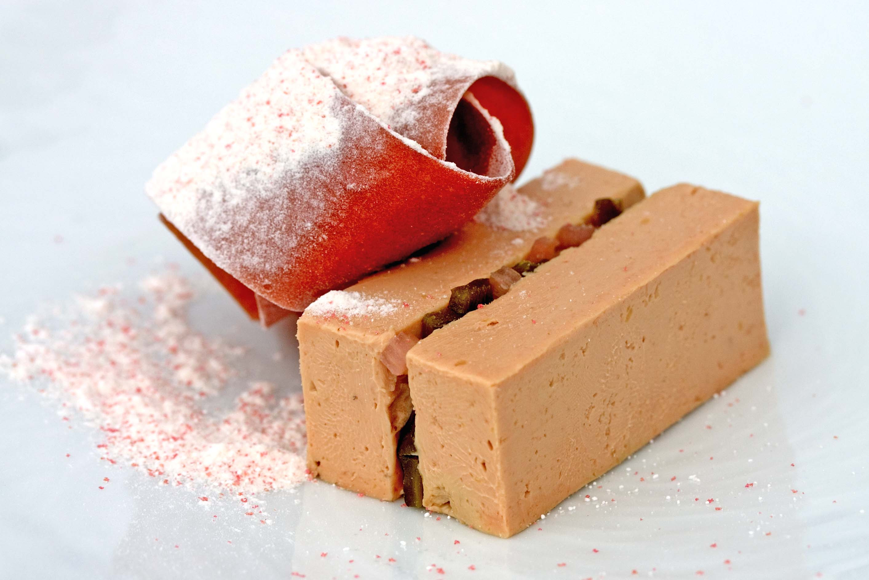 Foie Gras Rhubarb, poblano, powdered yogurt